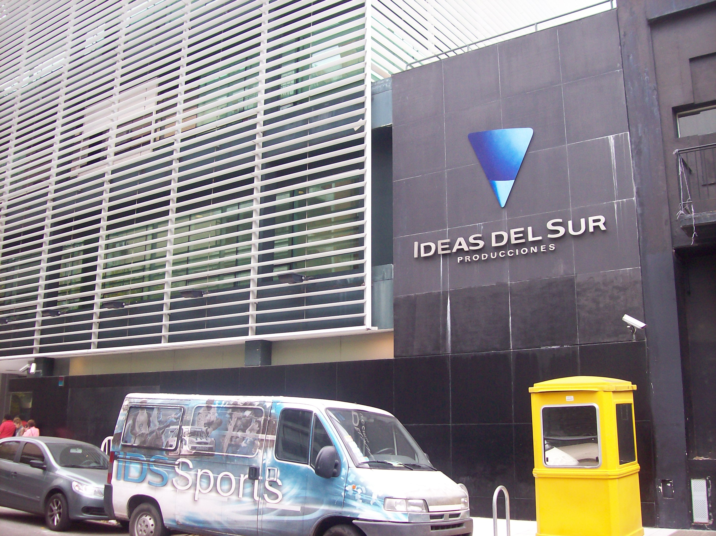 Estudios de Ideas del Sur, en calle Olleros 3551, Buenos Aires, Argentina.